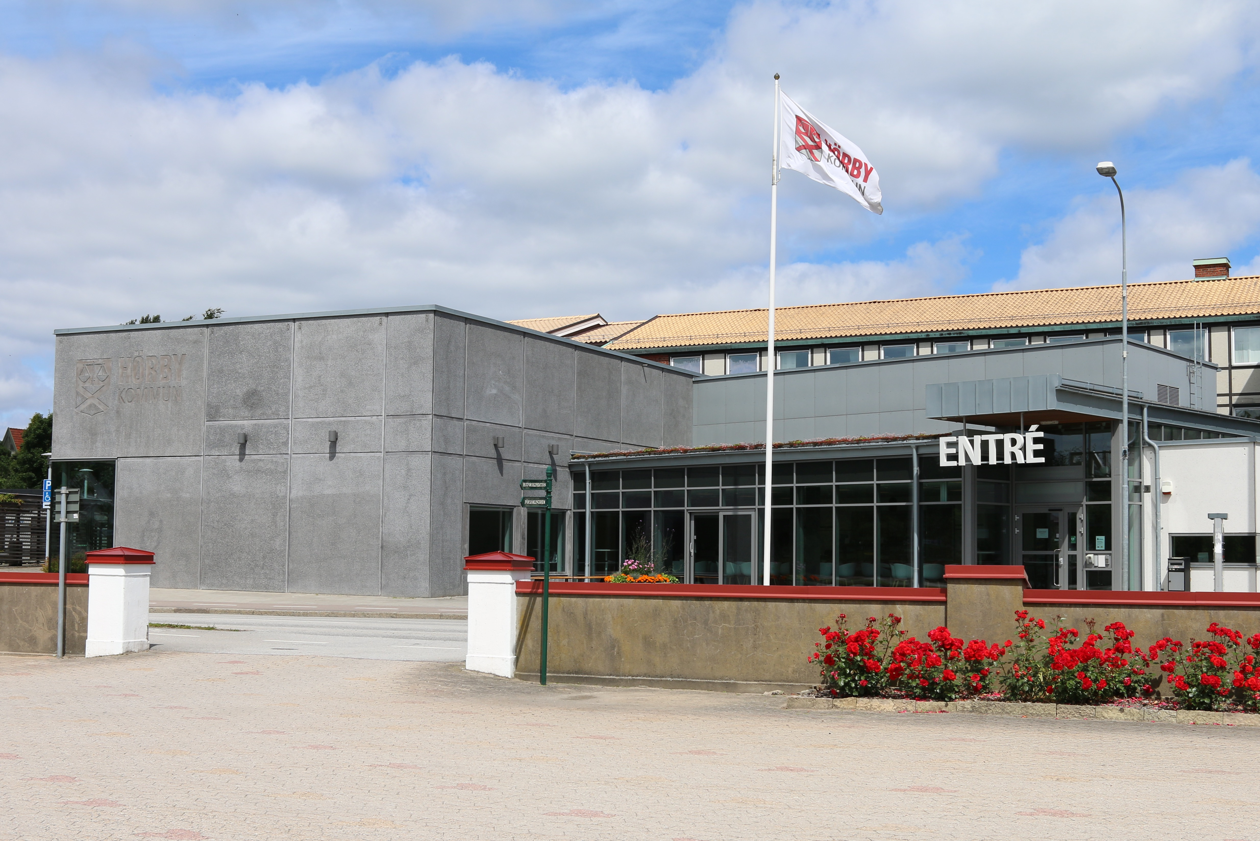 Hörby kommunhus